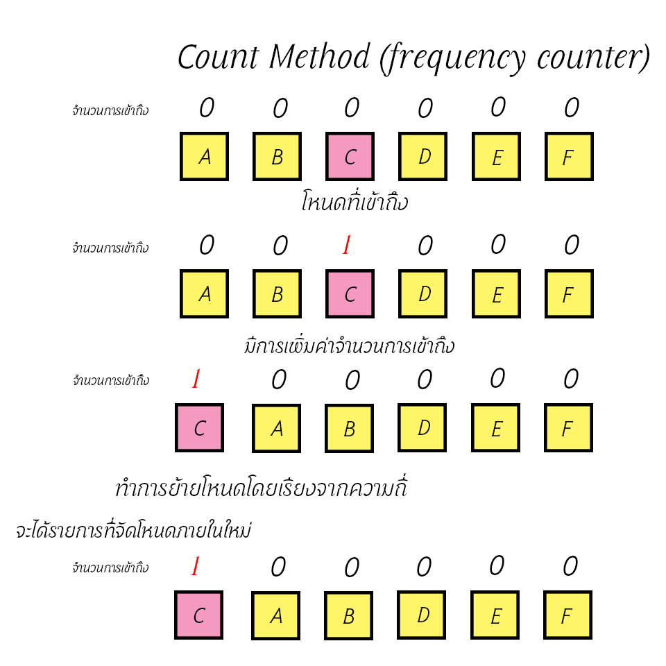 ขั้นตอนวิธีจัดโหนดภายในรายการแบบ Count Method (frequency counter)